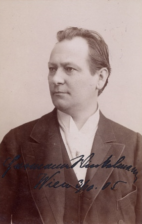 Hermann Winkelmann 1905